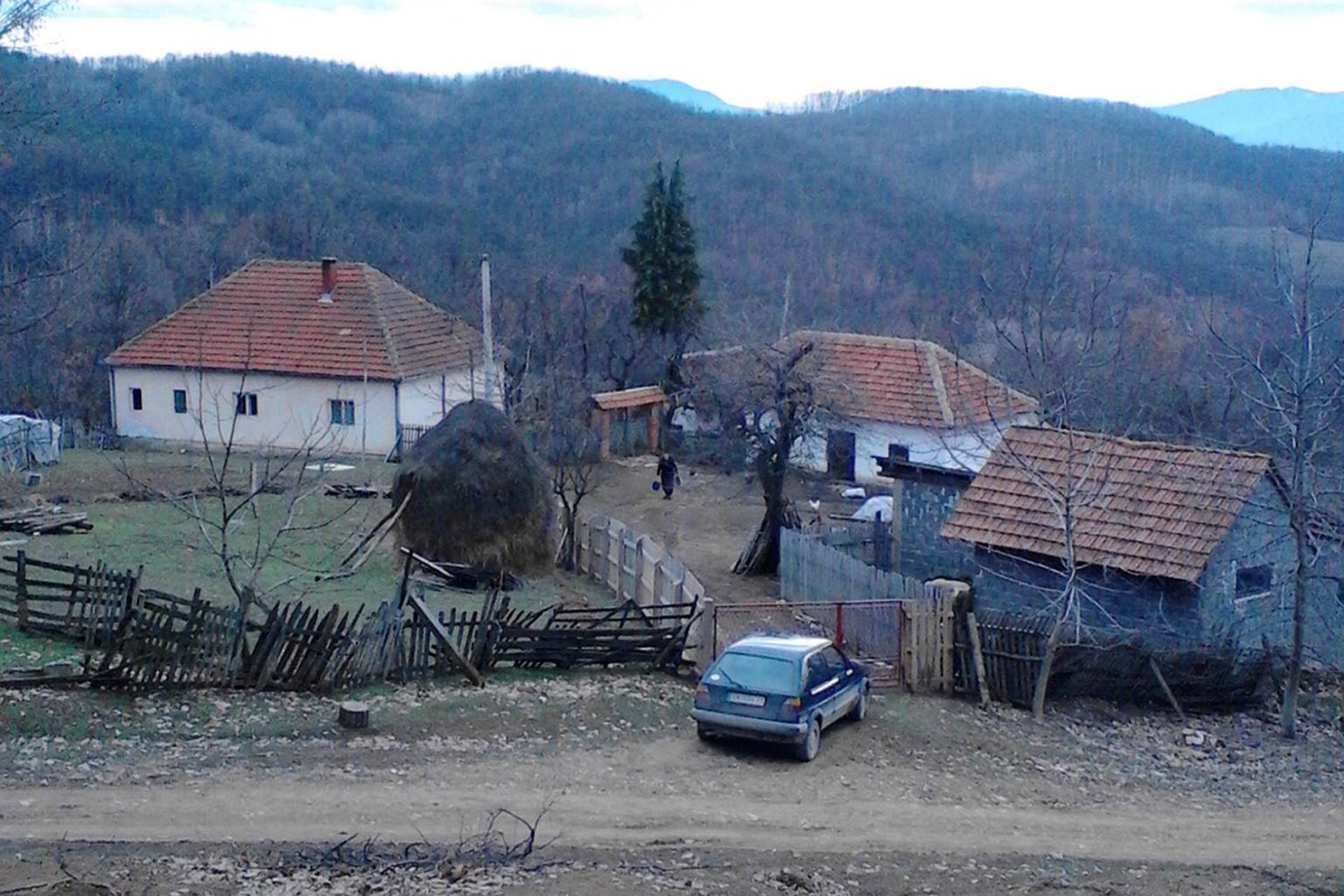 Село Теочин, Горњи Милановац. Домаћинство Брковића.